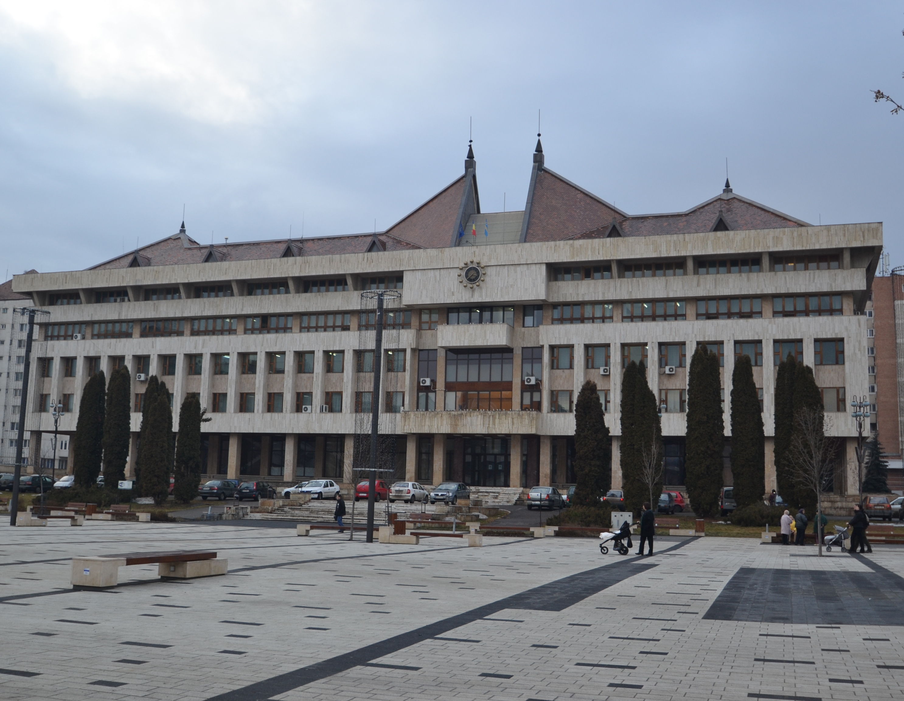 Clădirea Consiliului Judeţean.